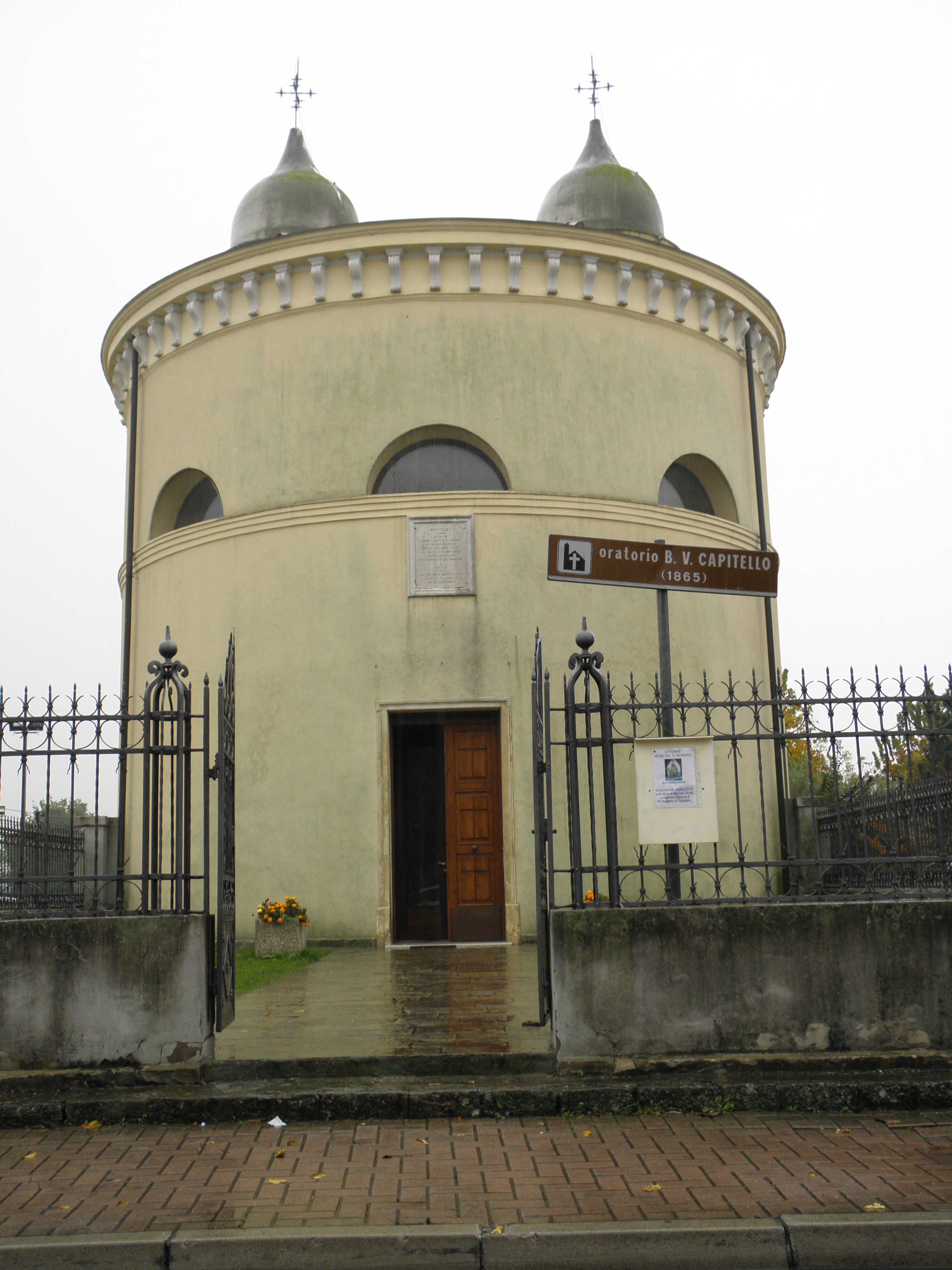 Oratorio della Beata Vergine del Capitello (o semplicemente del Capitello), Anguillara Veneta, provincia di Padova.